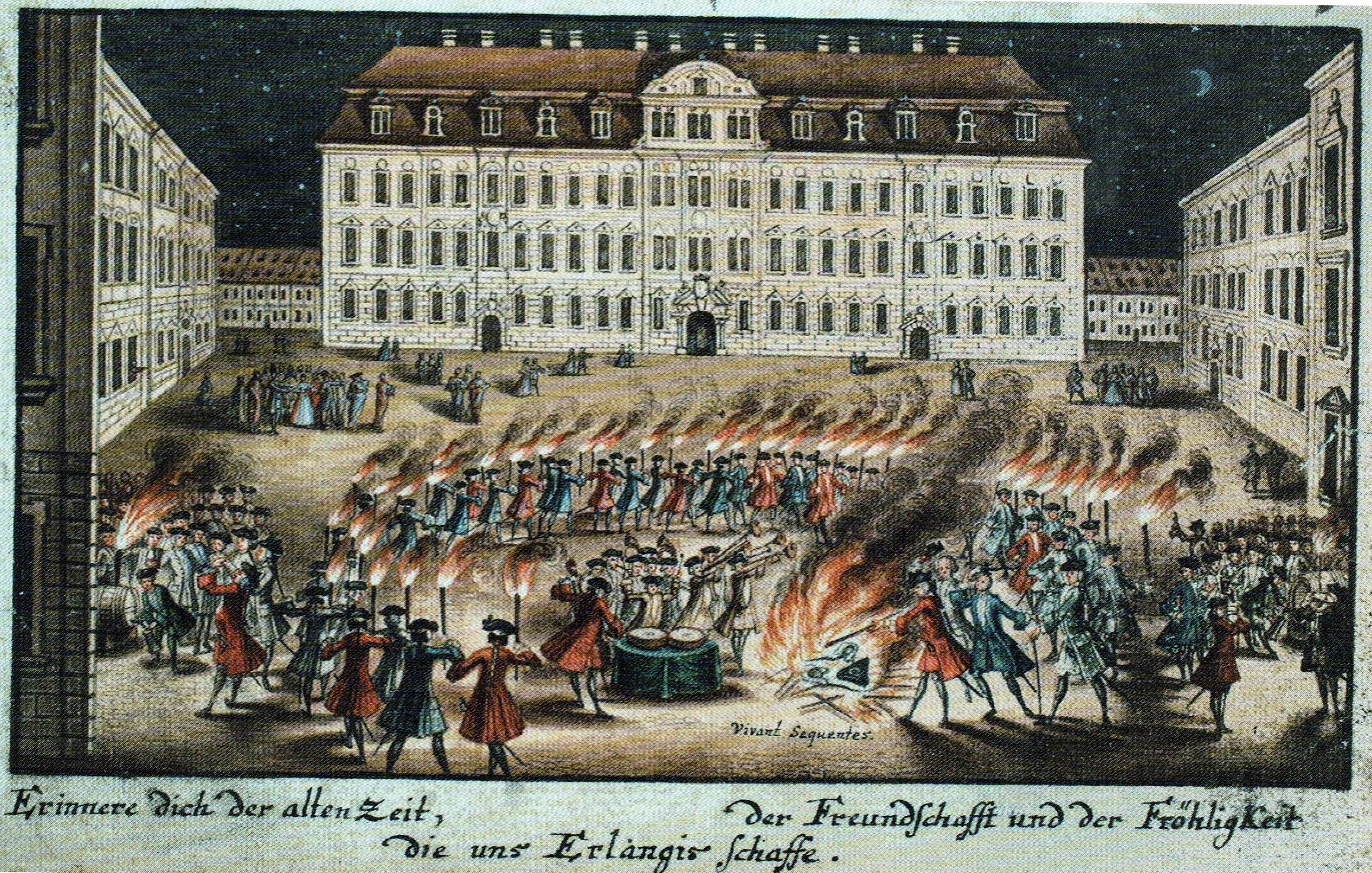 Studentischer Fackelzug vor dem Erlanger Schloss. Stammbuchblatt im Institut für Hochschulkunde, Würzburg